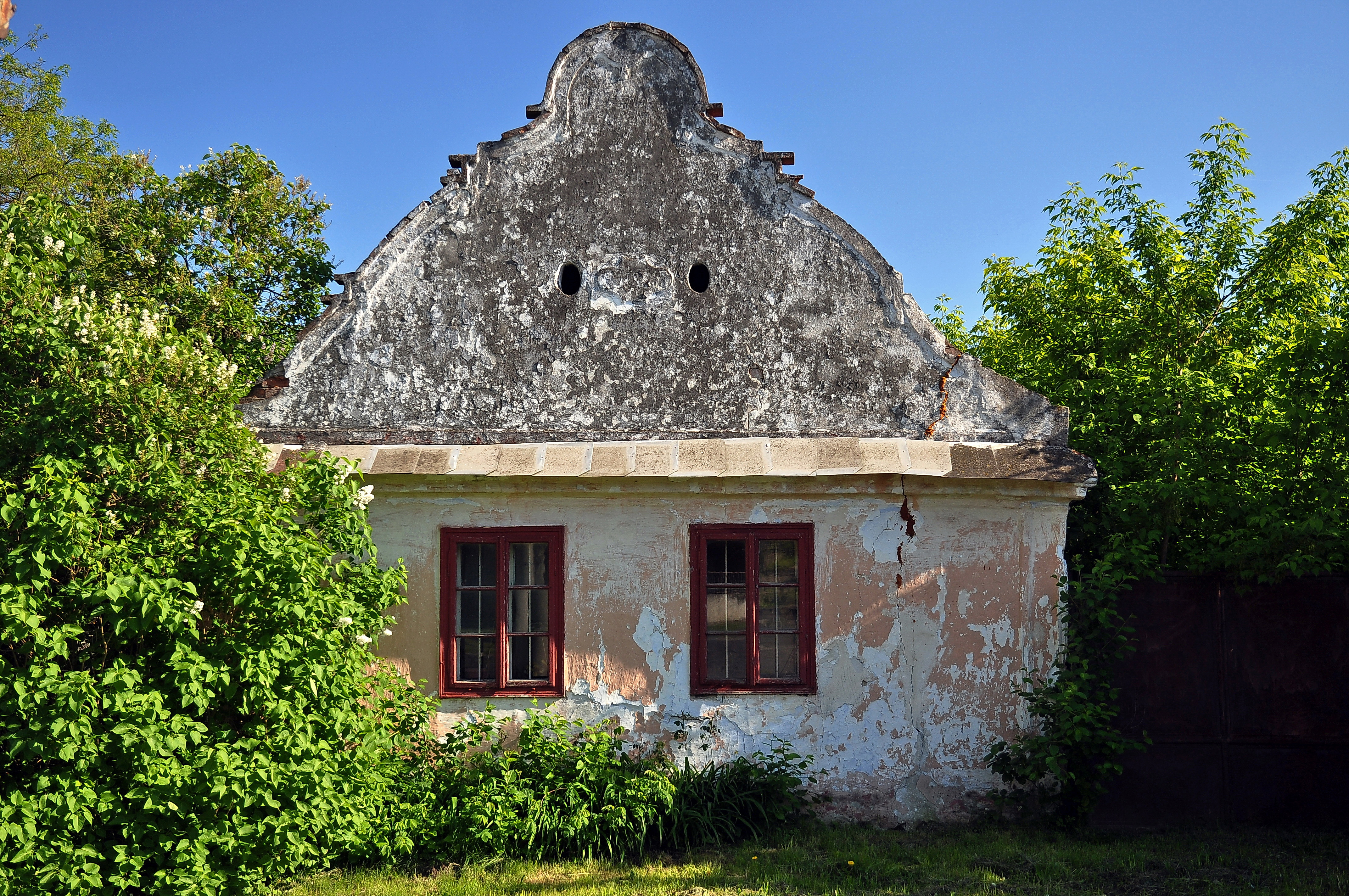 Láb, ľudové domy, Slovensko